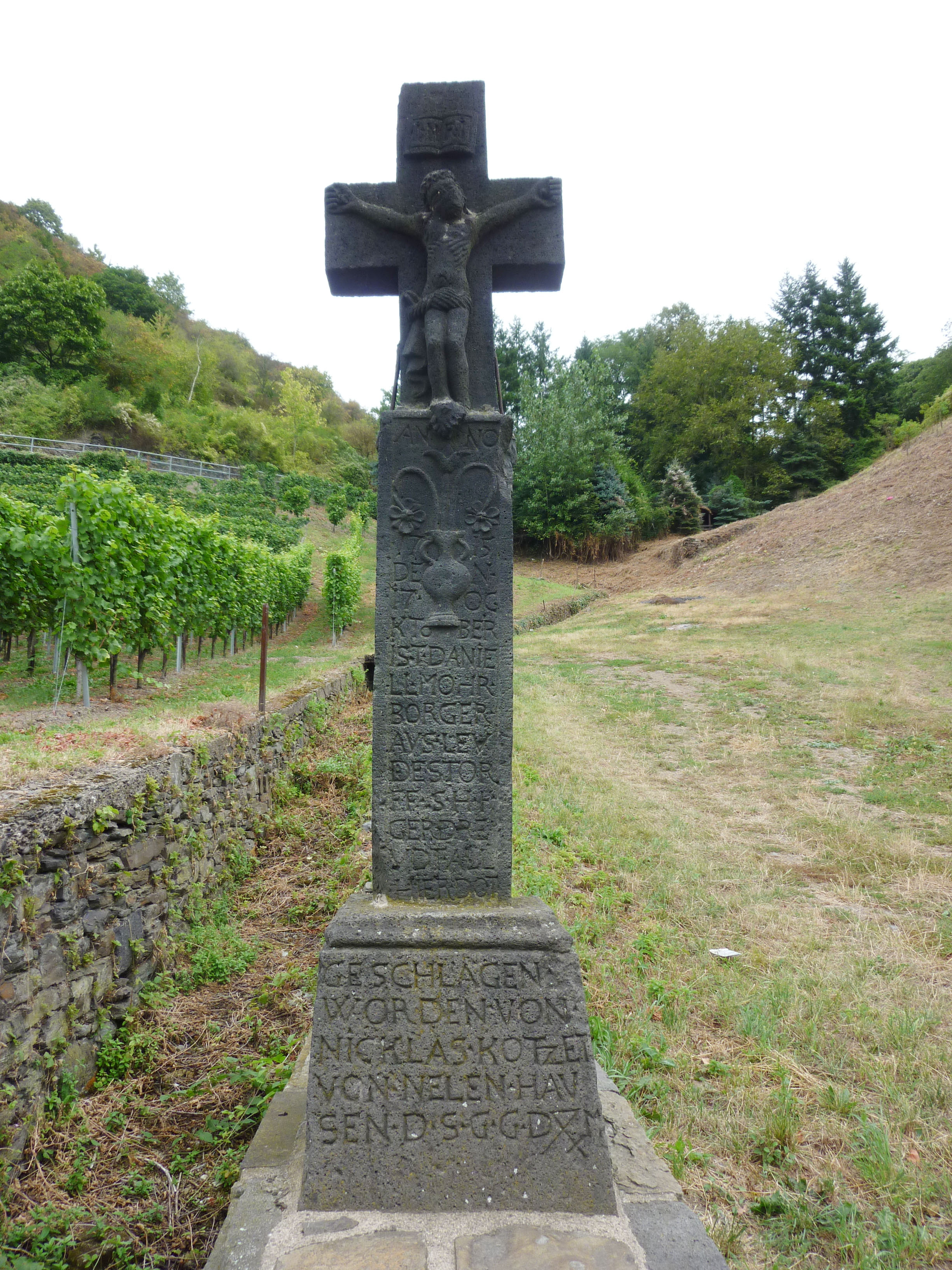 Das Mohr'sche Mordkreuz in Leutesdorf